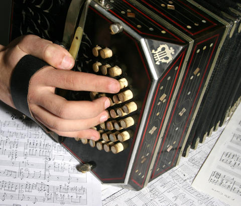 Foto de bandoneón, lado derecho